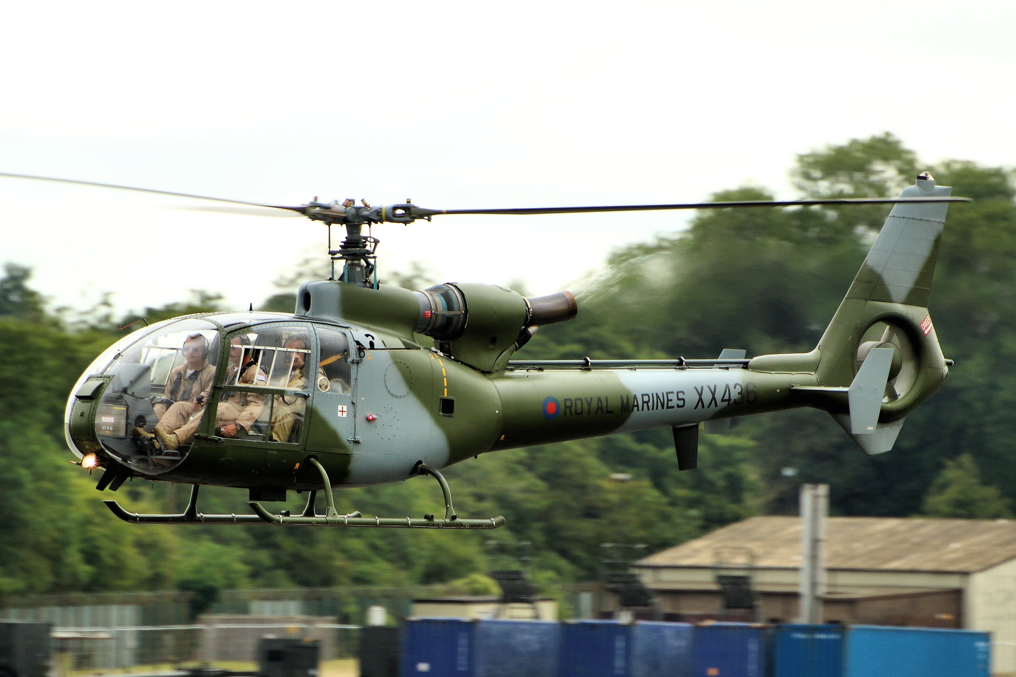 Gazelle - RIAT 2015